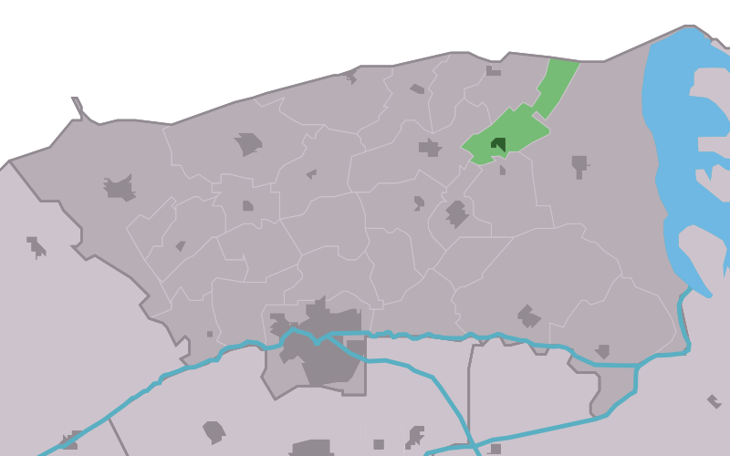 Kaartsje fan himrik fan Ljussens